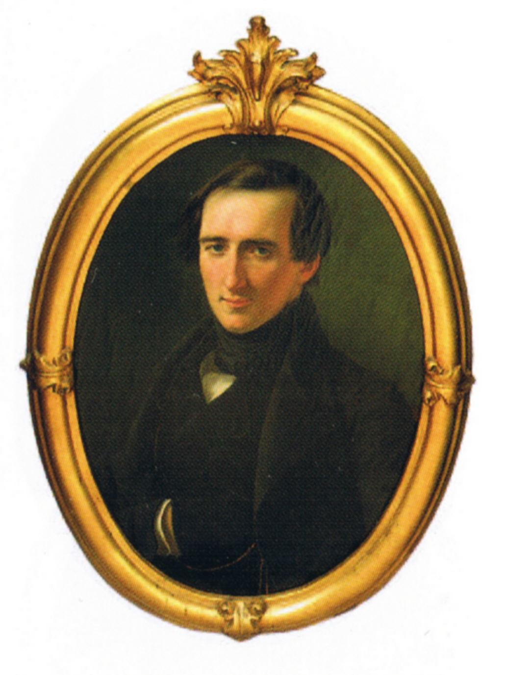 Otto Carl Josias Graf von Rantzau (1809-1864), Herr auf Aschau, Klosterprobst zu Uetersen (1847-1857) und preußischer Gesandter in Dresden.